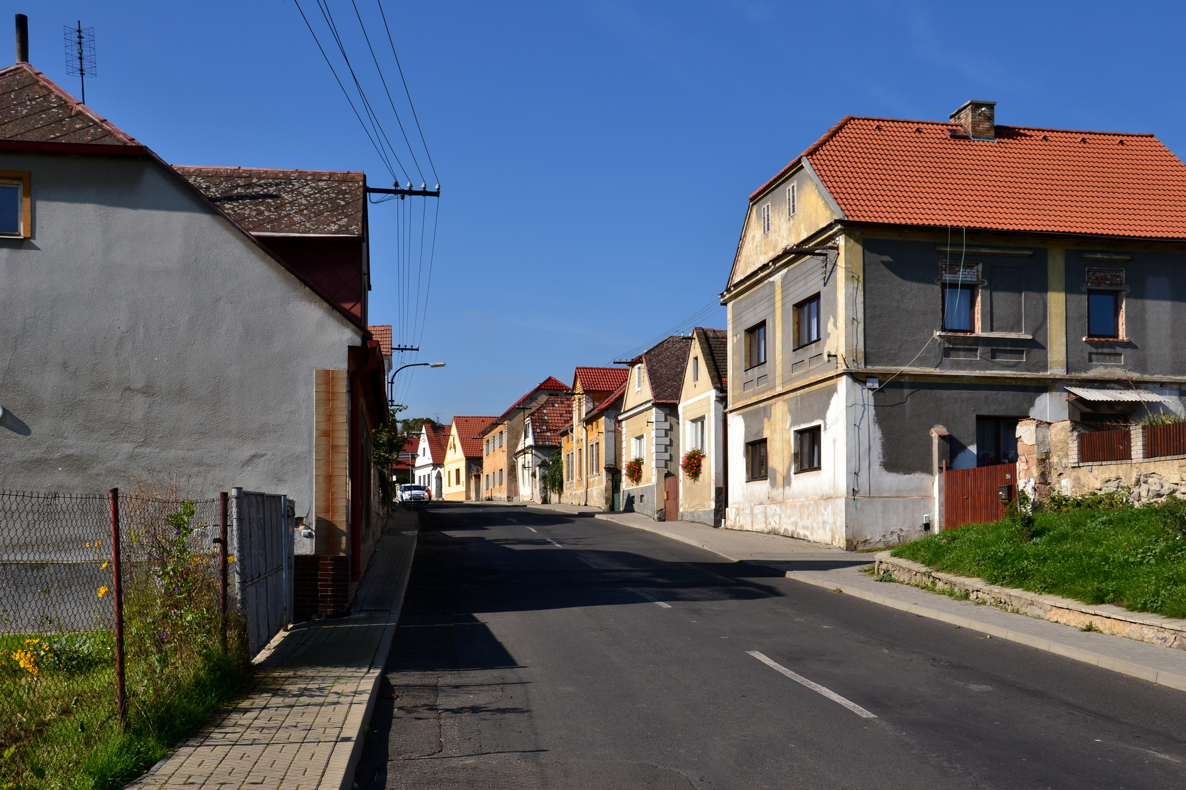 Nepomyšl - ulice směrem od Podbořan ke středu obce